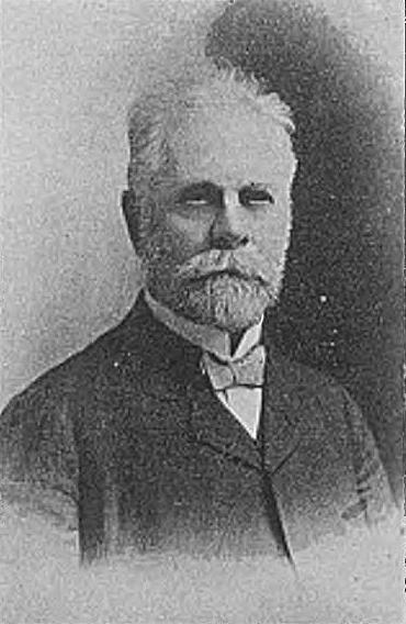 Leon Syroczyński